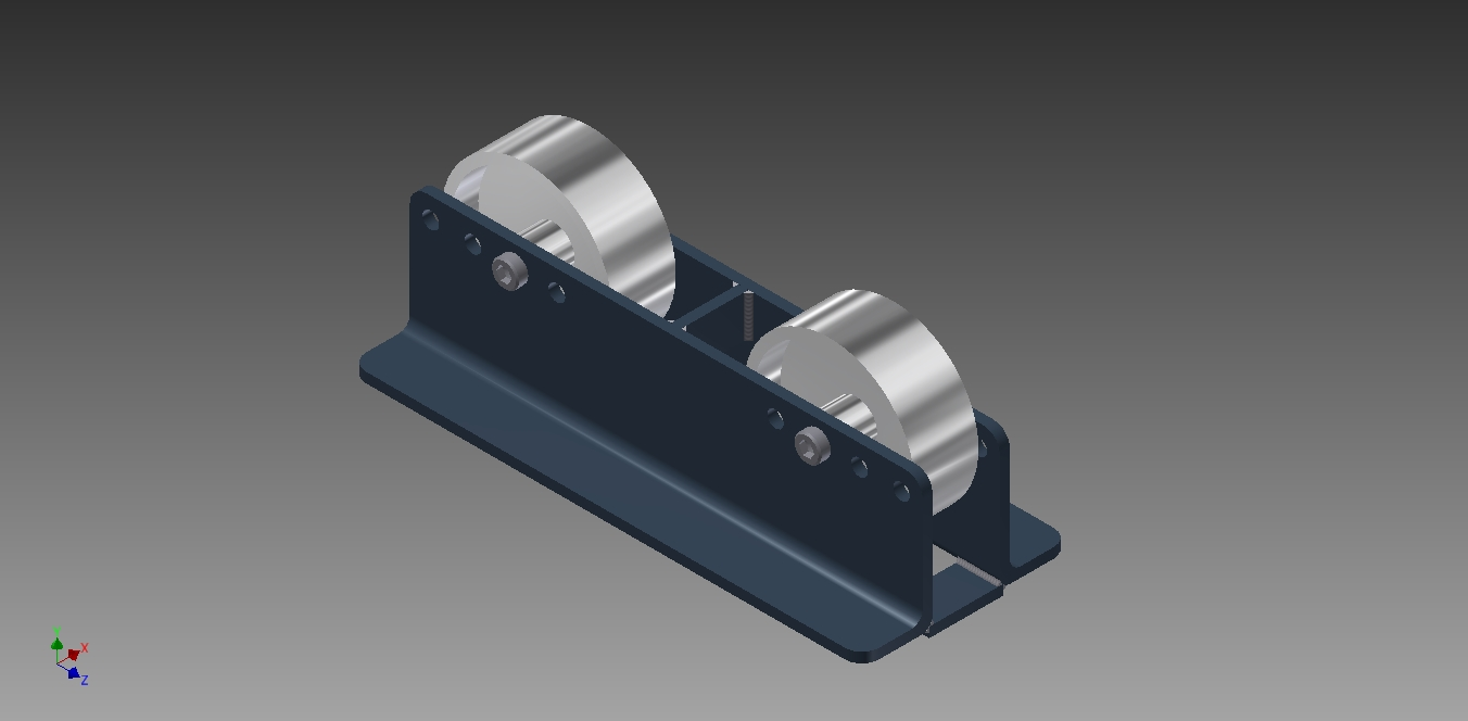 Assemblage soudé dans Autodesk Inventor 2012.